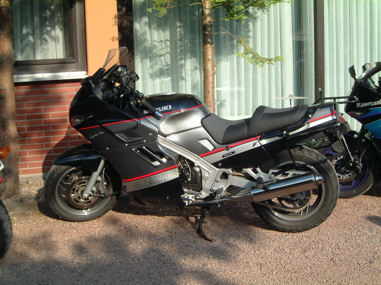 GSX1100F